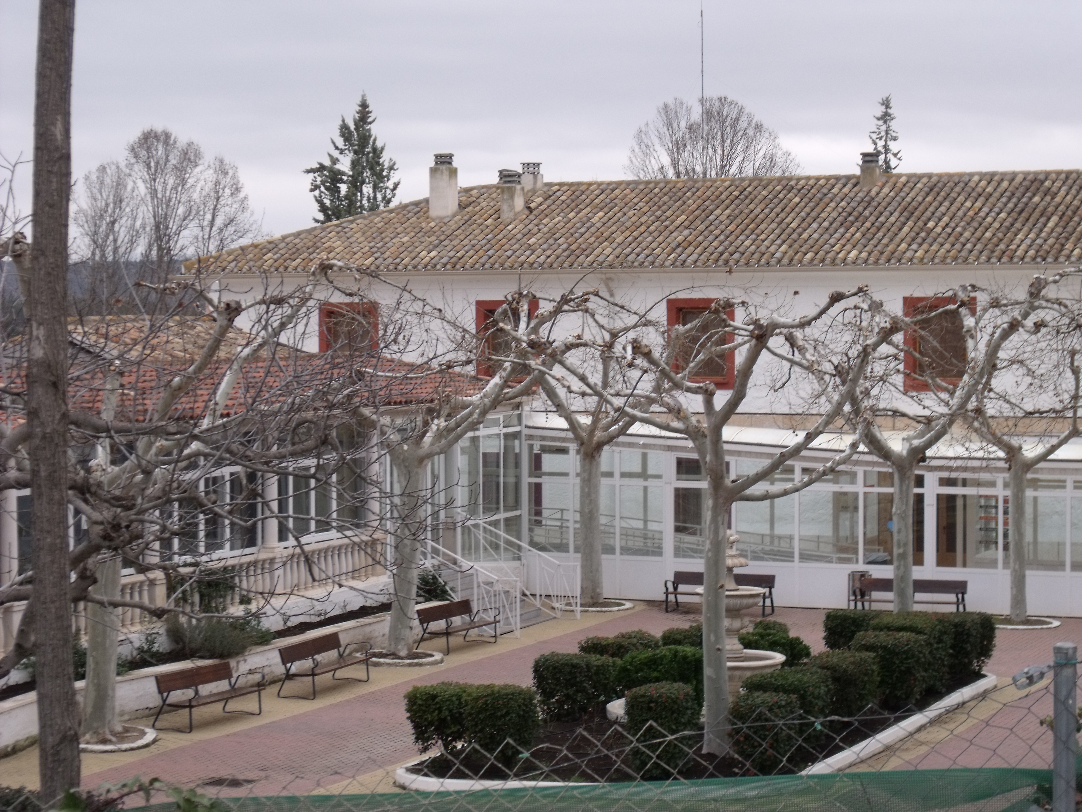 Exterior de las instalaciones del Balneario Baños de la Concepción